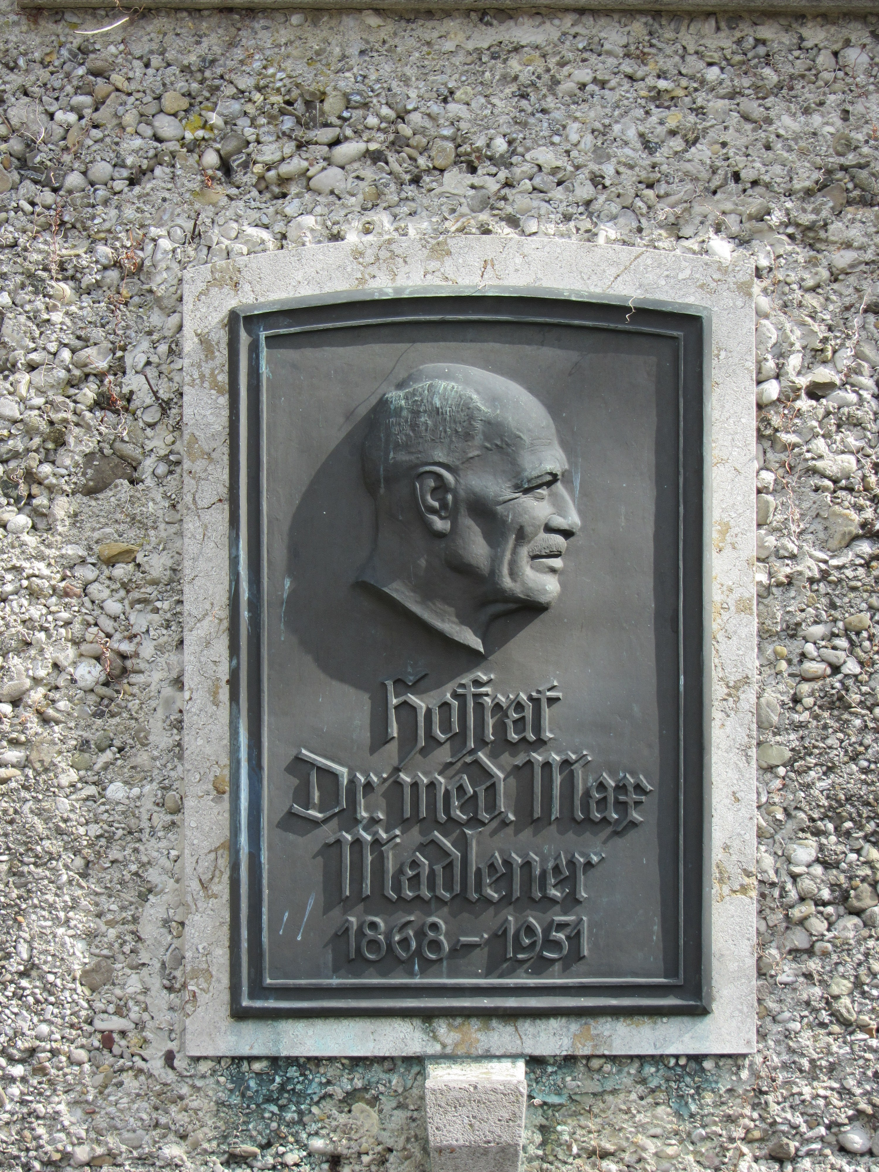 Städtischer Zentralfriedhof (Kempten) - Ehrenmal Ehrenbürger